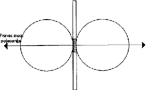 Srpski (latinica): Karakteristika usmerenosti antene AMC/1